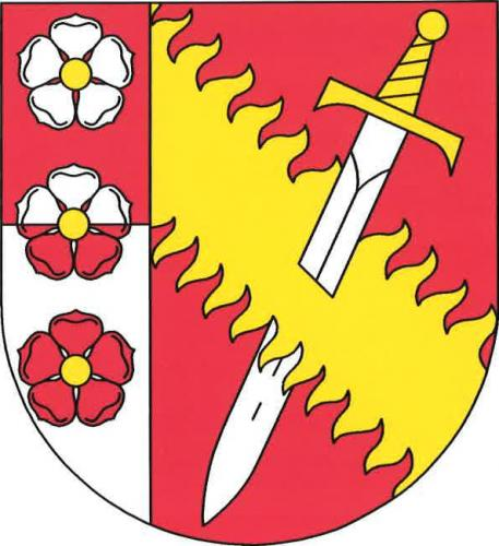 Znak, Semněvice, okres Domažlice. "Vpravo polcený štít. Pravé pole červeno-stříbrně dělené se třemi růžemi opačných barev pod sebou a se zlatými semeníky. V levém červeném poli kosmé zlaté plamenné břevno šikmo shora probodnuté stříbrným mečem se zlatým jílcem."